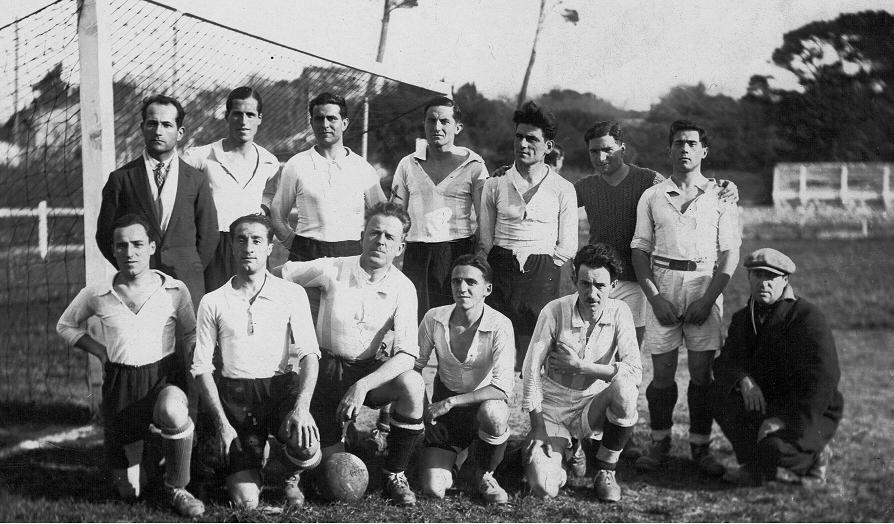 Equipe de l'OM avec André Gascard (croix bleue)